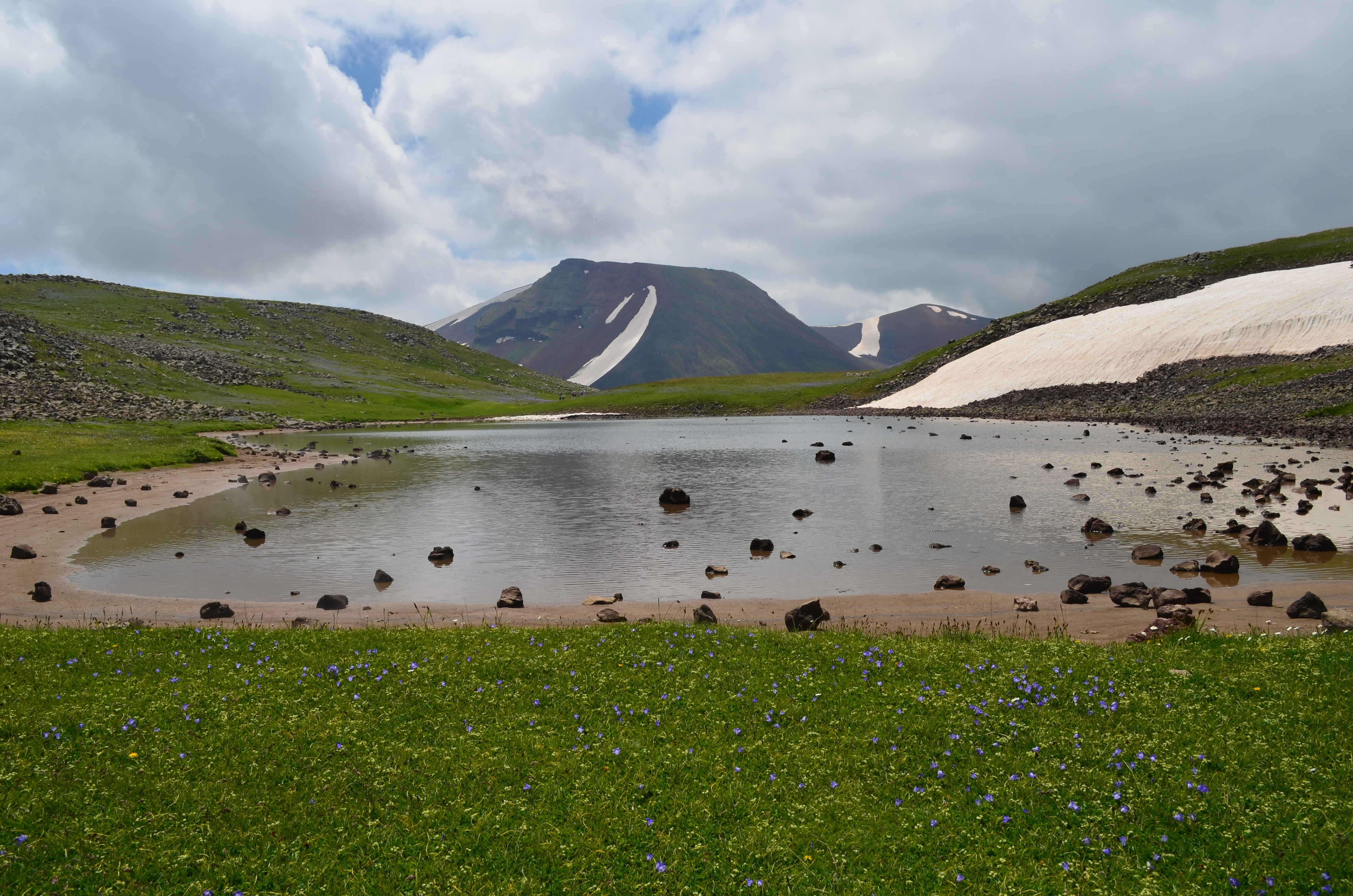 Աժդահակ1